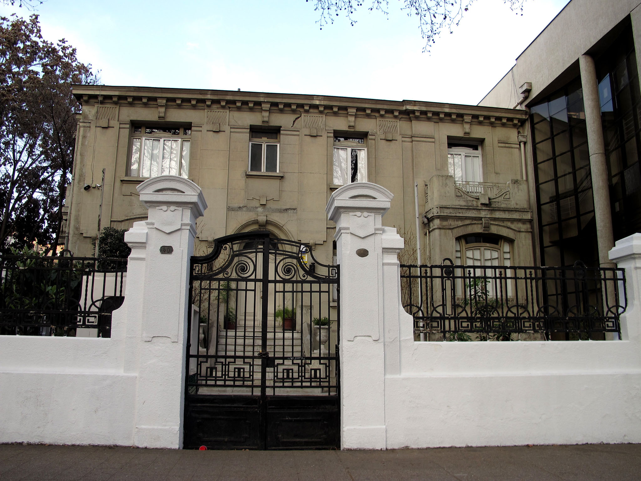 Barrio Parque Bustamante